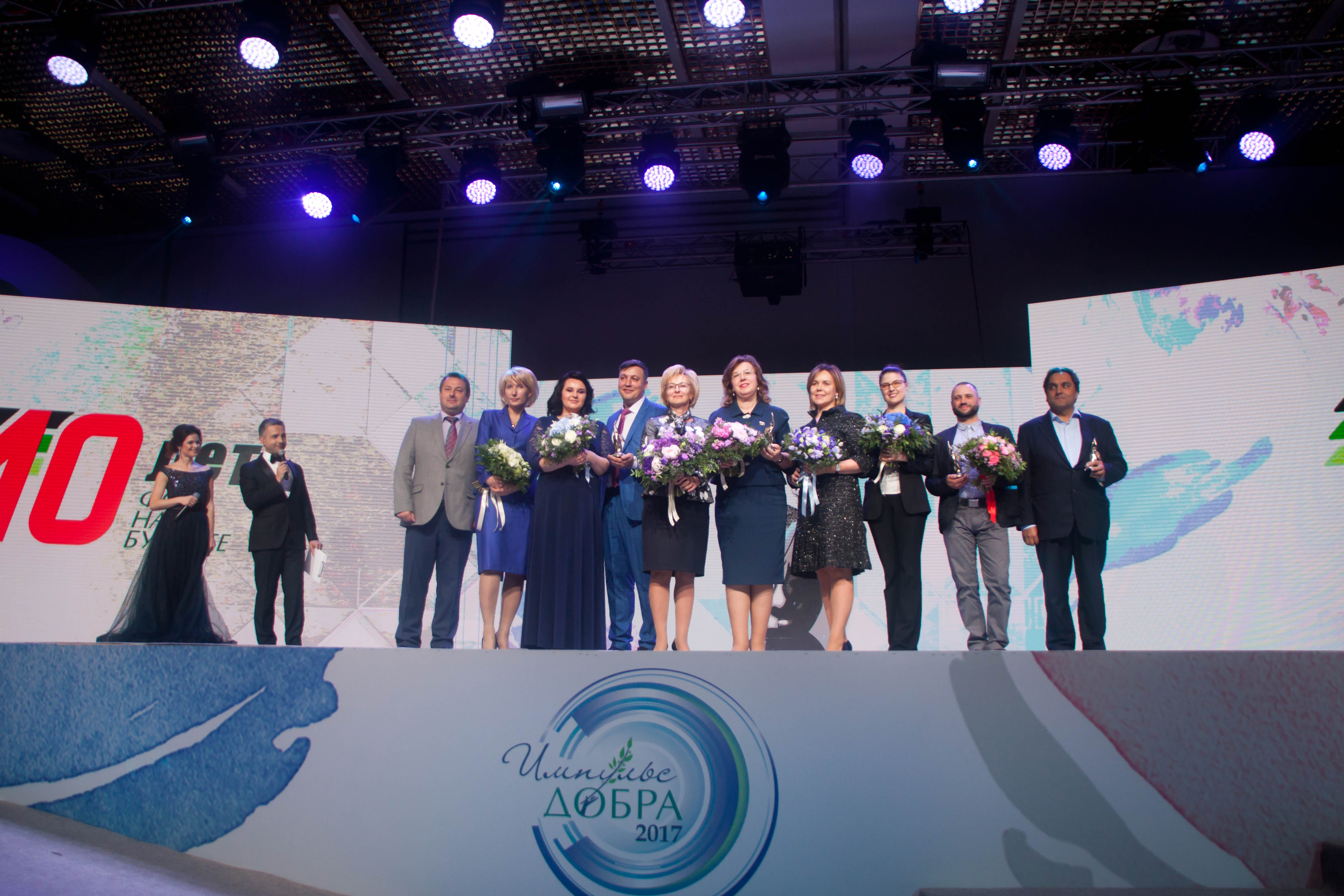 Церемония вручения премии "Импульс добра" в области социального предпринимательства в конгресс-парке гостиницы "Украина", Москва, 17 мая 2017